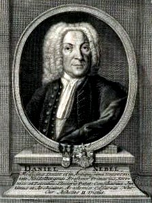 Scan eins Porträts aus dem Bildarchiv Austria